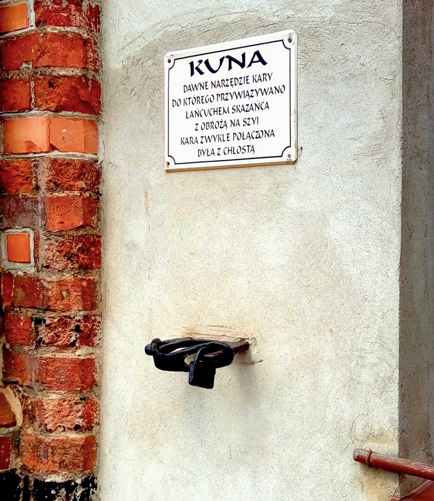 Kuna na wschodniej ścianie ratusza w Kamieniu Pomorskim Wikidata has entry Q9304412 with data related to this item.